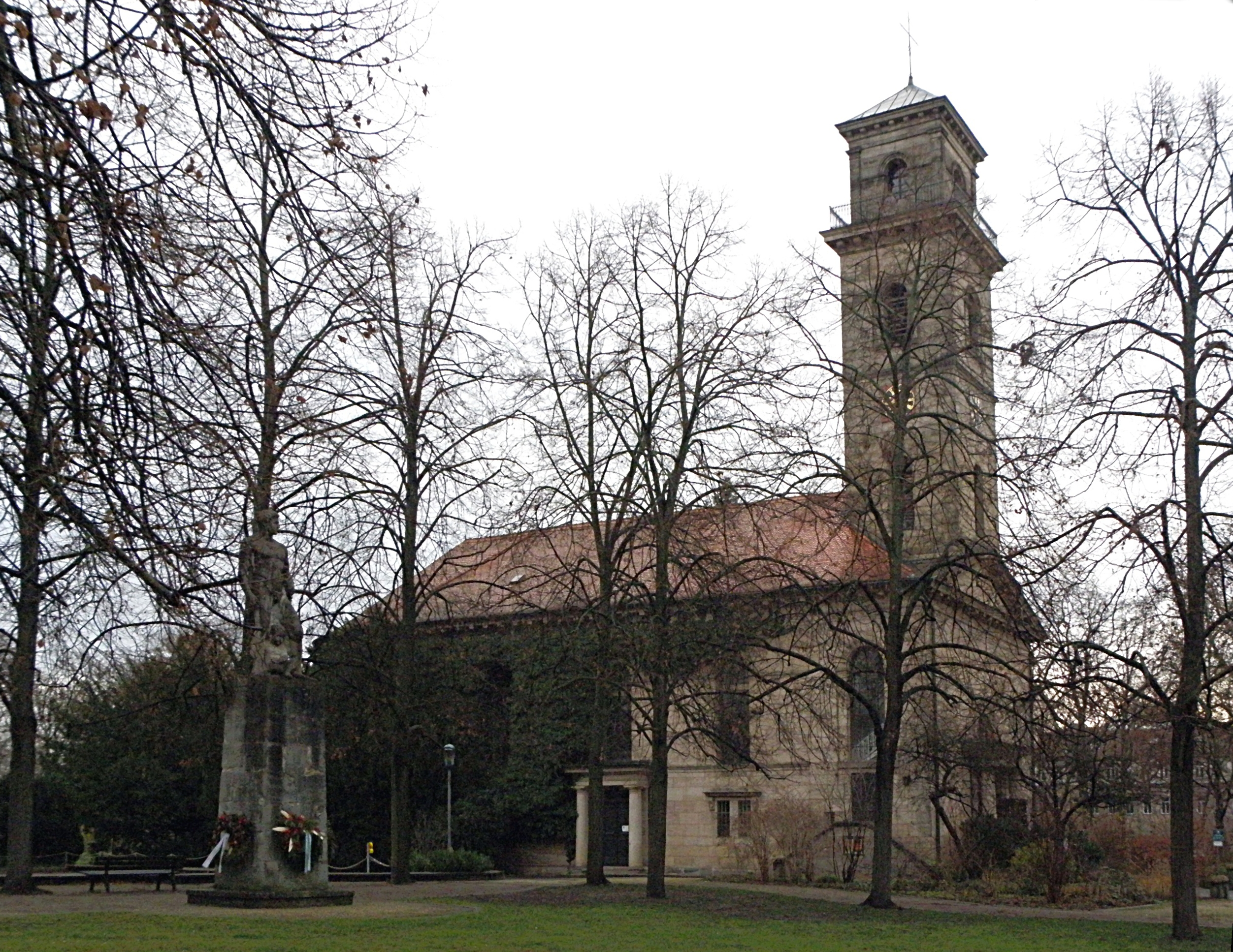 Fürth, Auferstehungskirche; Außenansicht Westseite